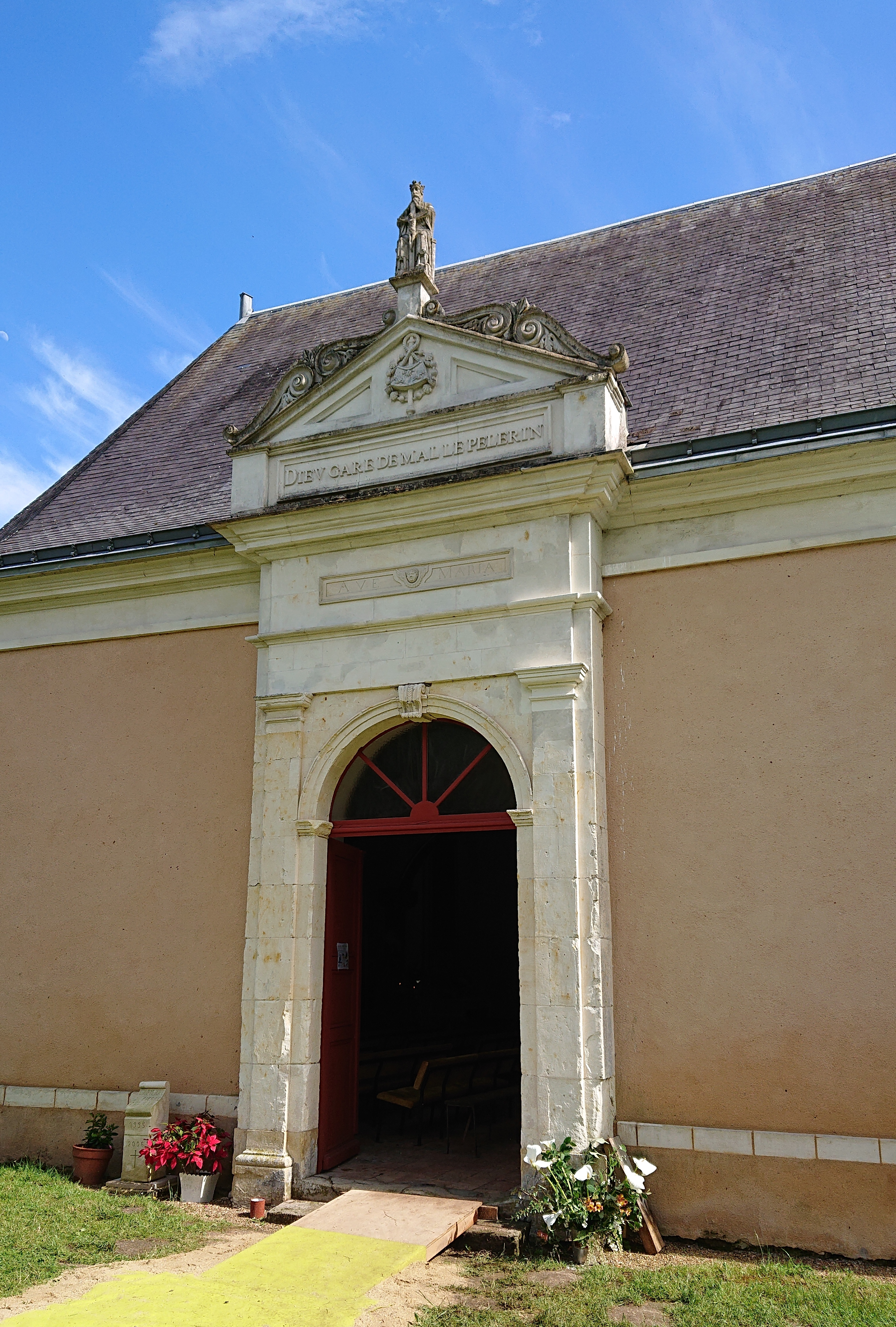 Chapelle Notre-Dame de la Faigne - Le portail d'entrée.